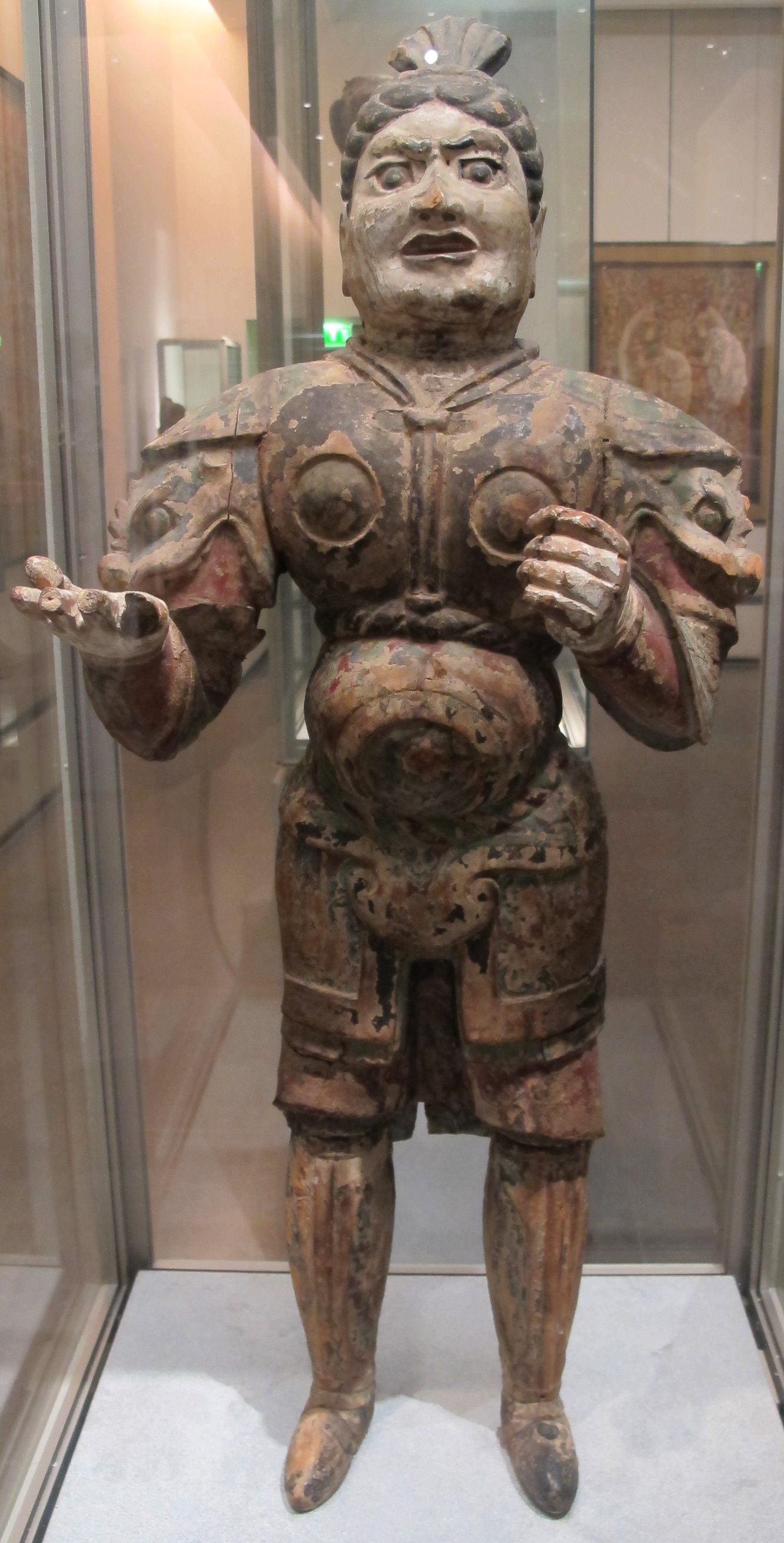 Dinastia tang, re celeste (lokapala), grotte di mogao, 690-710 ca.